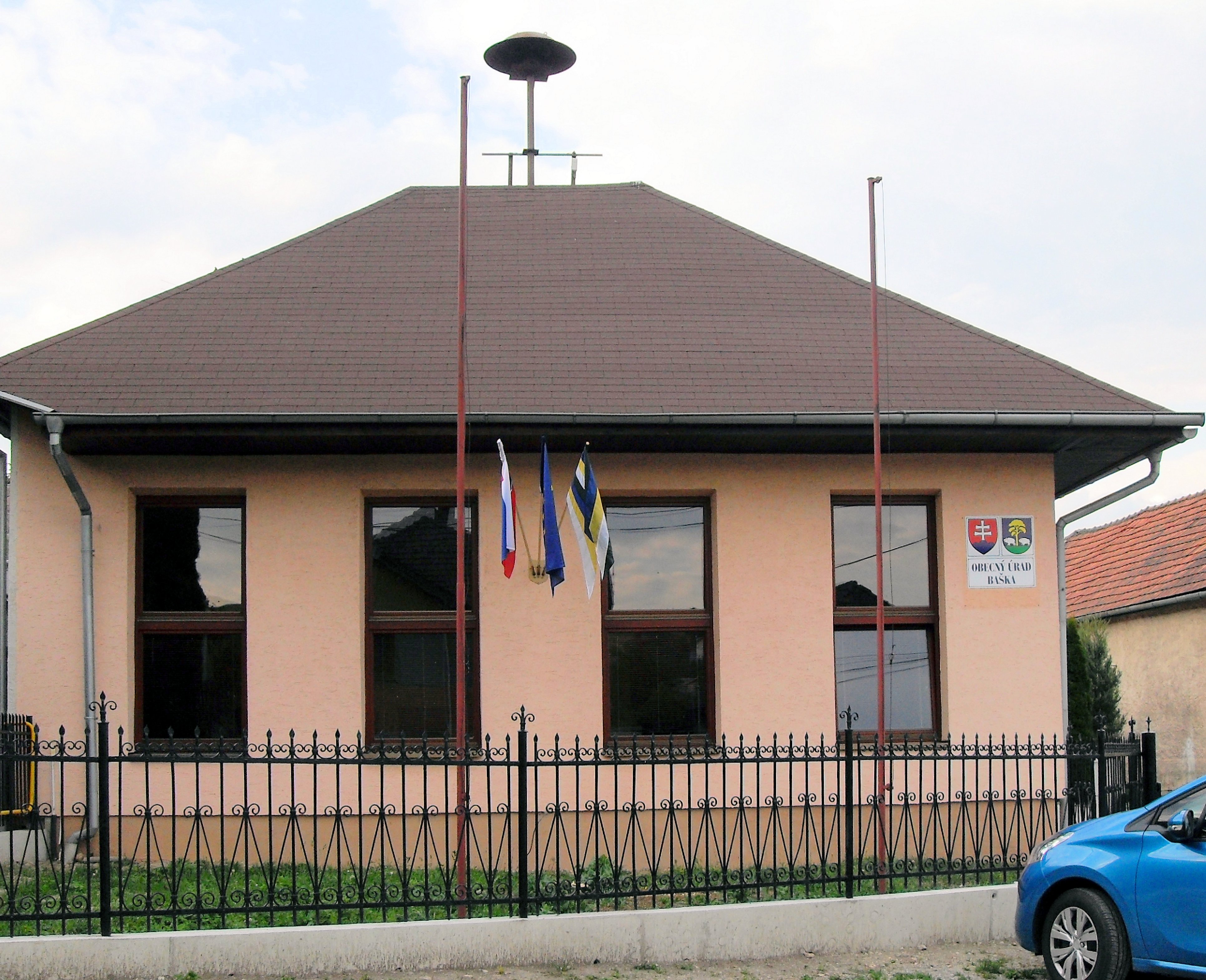 Obecný úrad v Baške